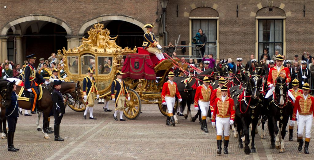 Gouden Koets bij aankomst op het Binnenhof